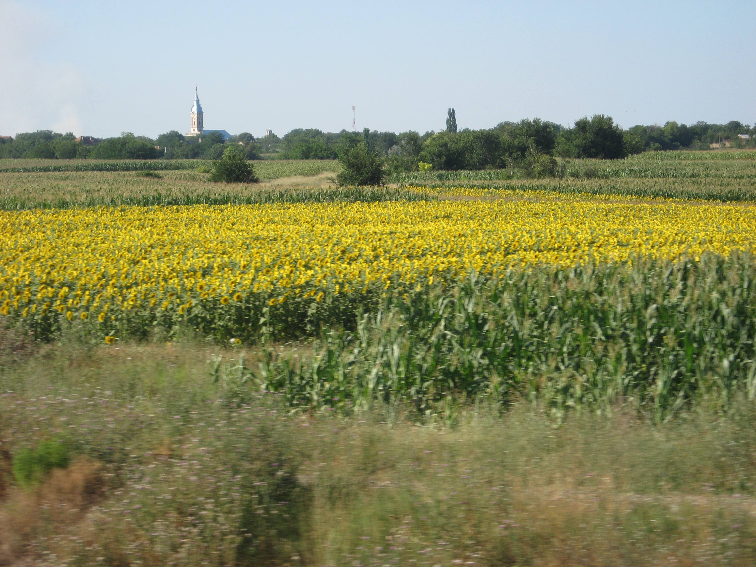 Јелена и Драган Цветковић, Сопствена слика Банат из воза Licensing